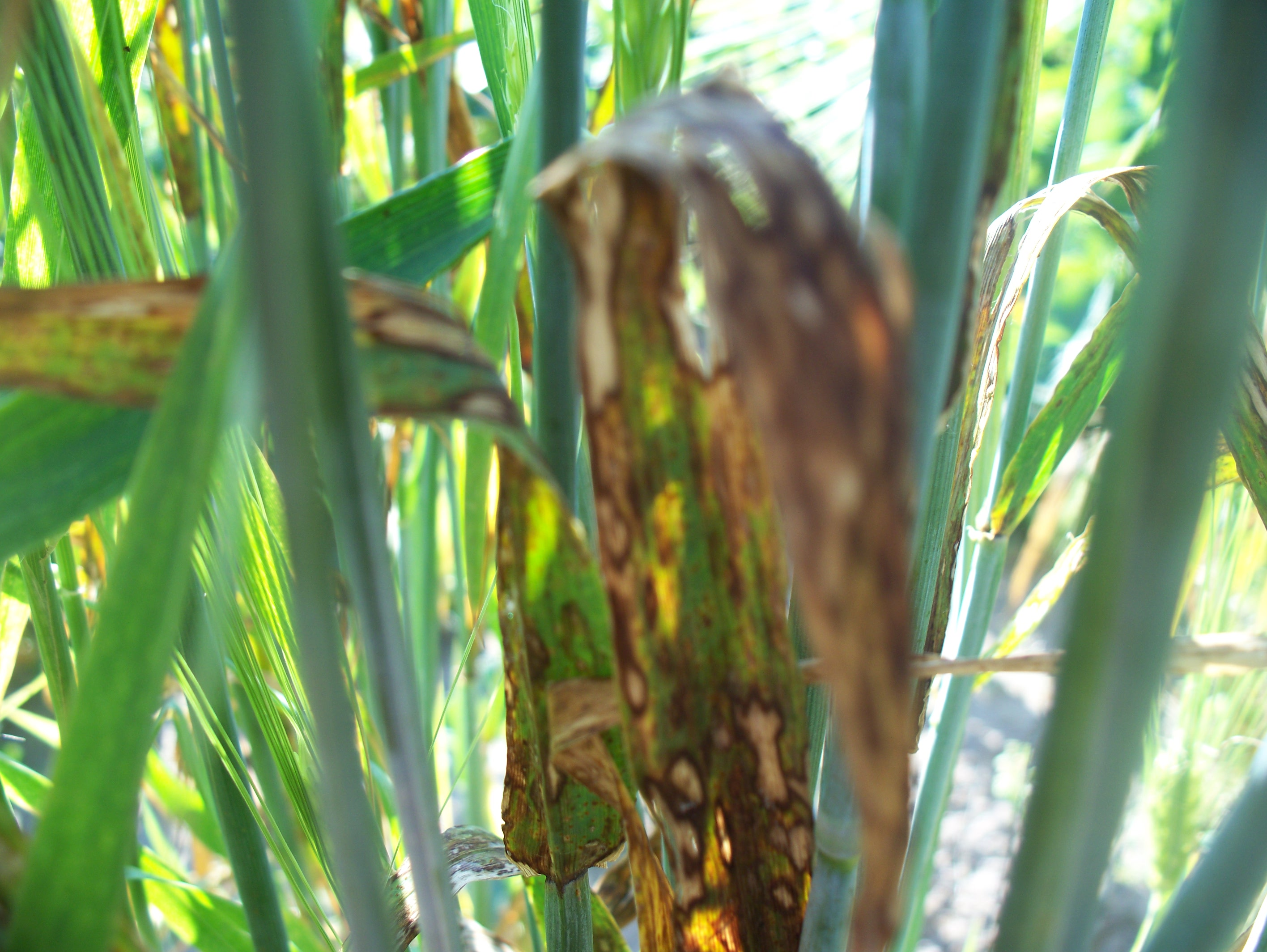 Rynchosporioza zbóż na jęczmieniu